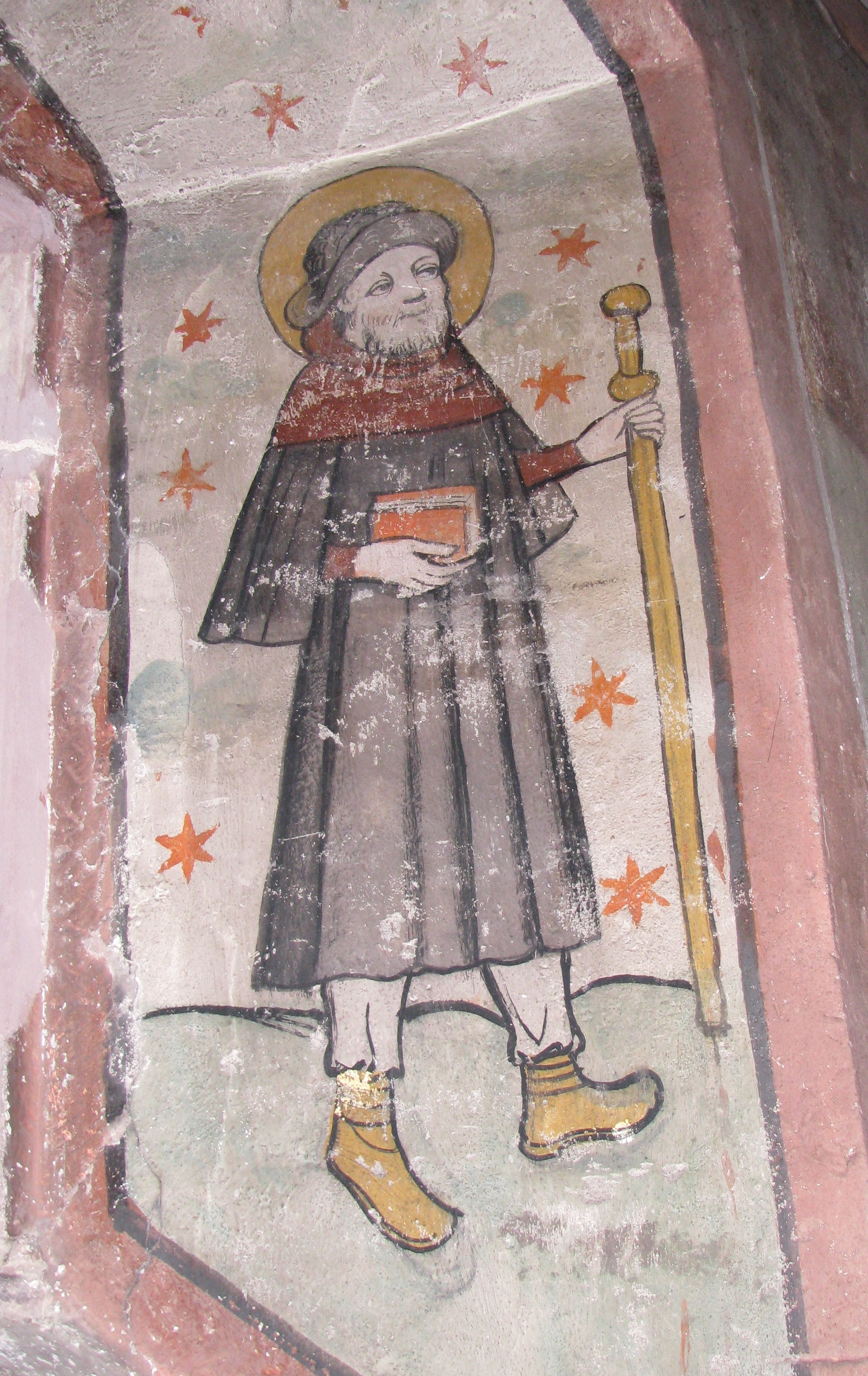 Pfarrkirche St. Vitus, Heidelberg-Handschuhsheim: Fresko aus der 1. Hälfte des 15. Jhs., hl. Wendelin